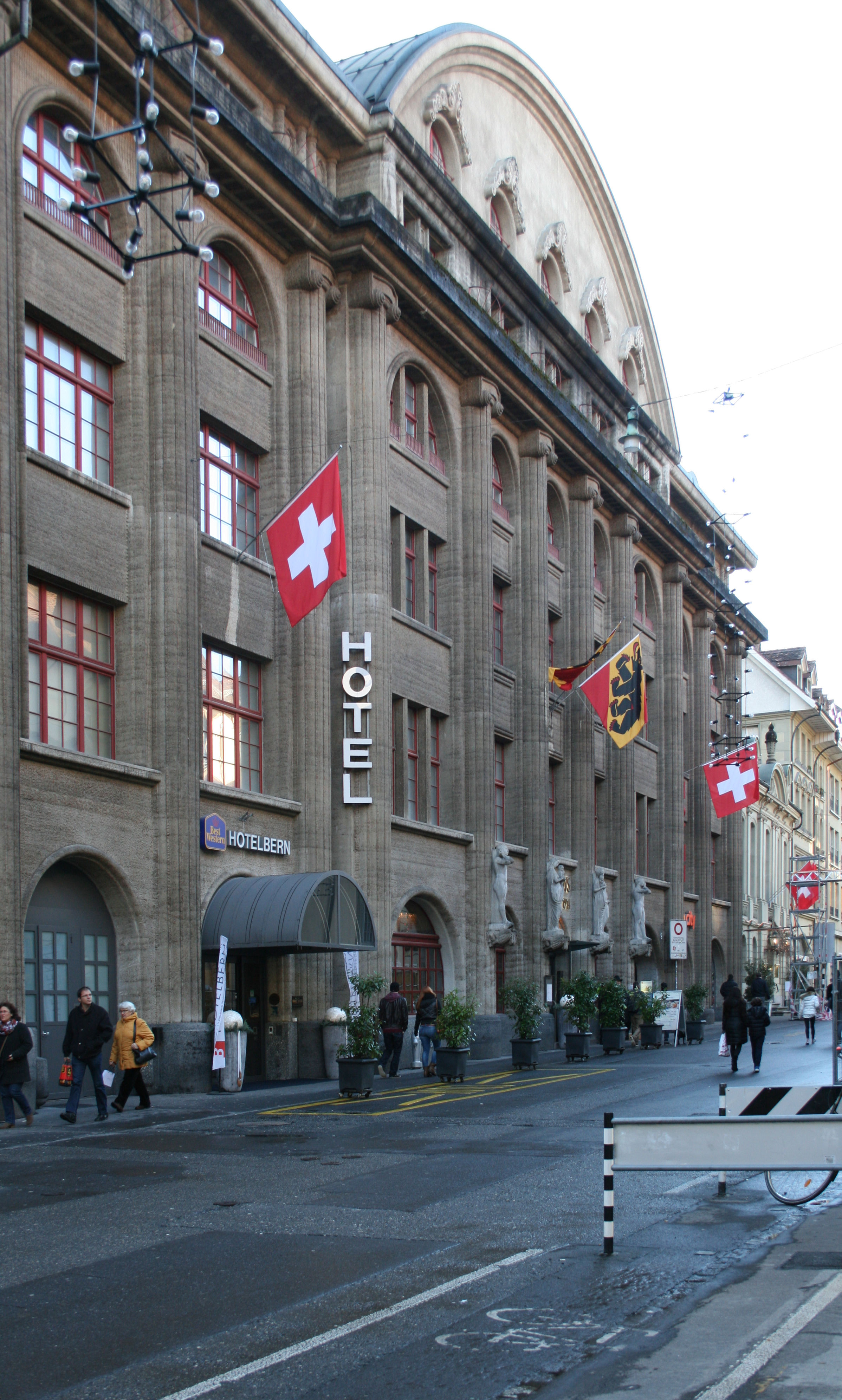 Volkshaus in Bern